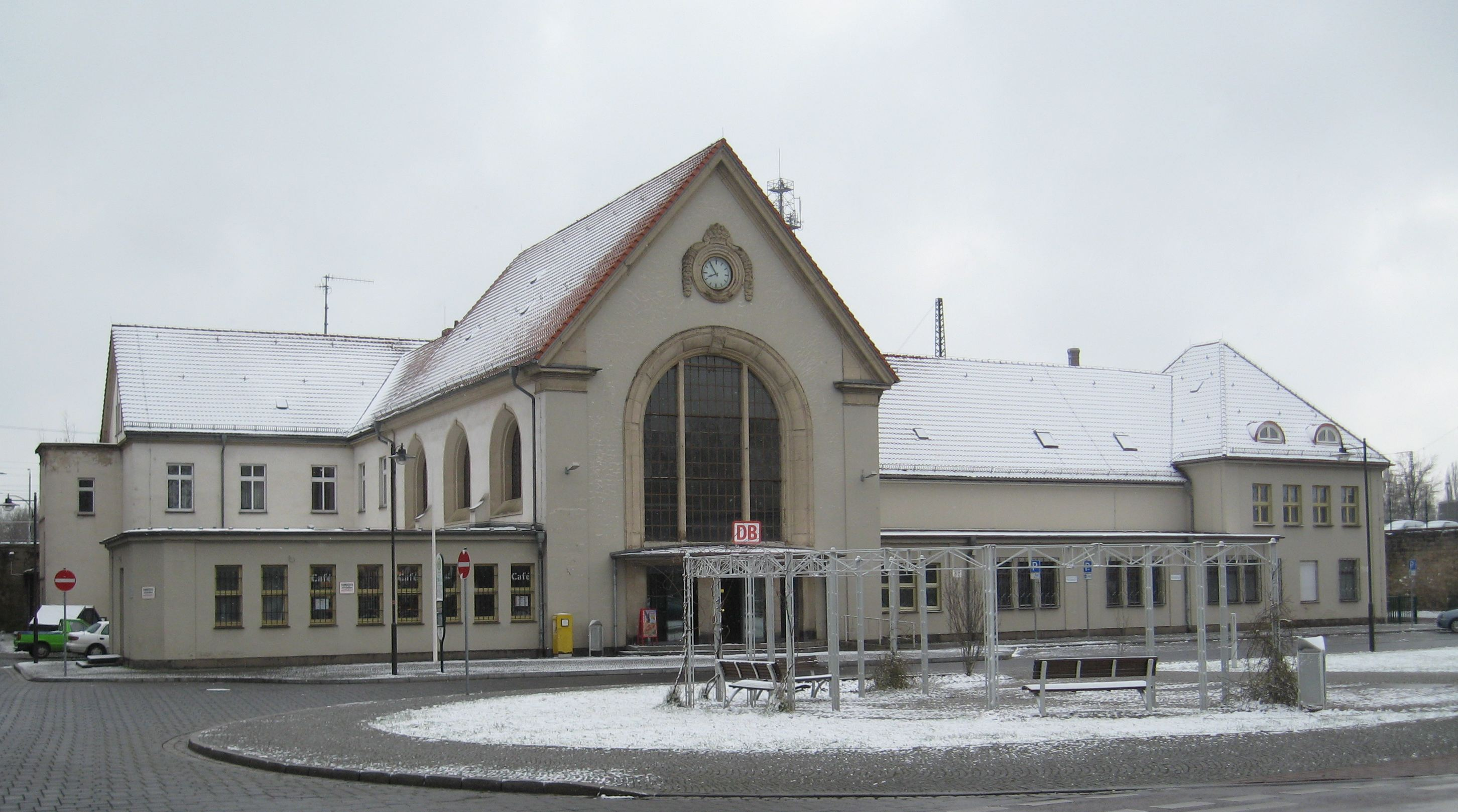 Bahnhof Köthen (Anhalt).